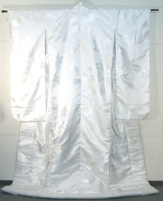 White Uchikake